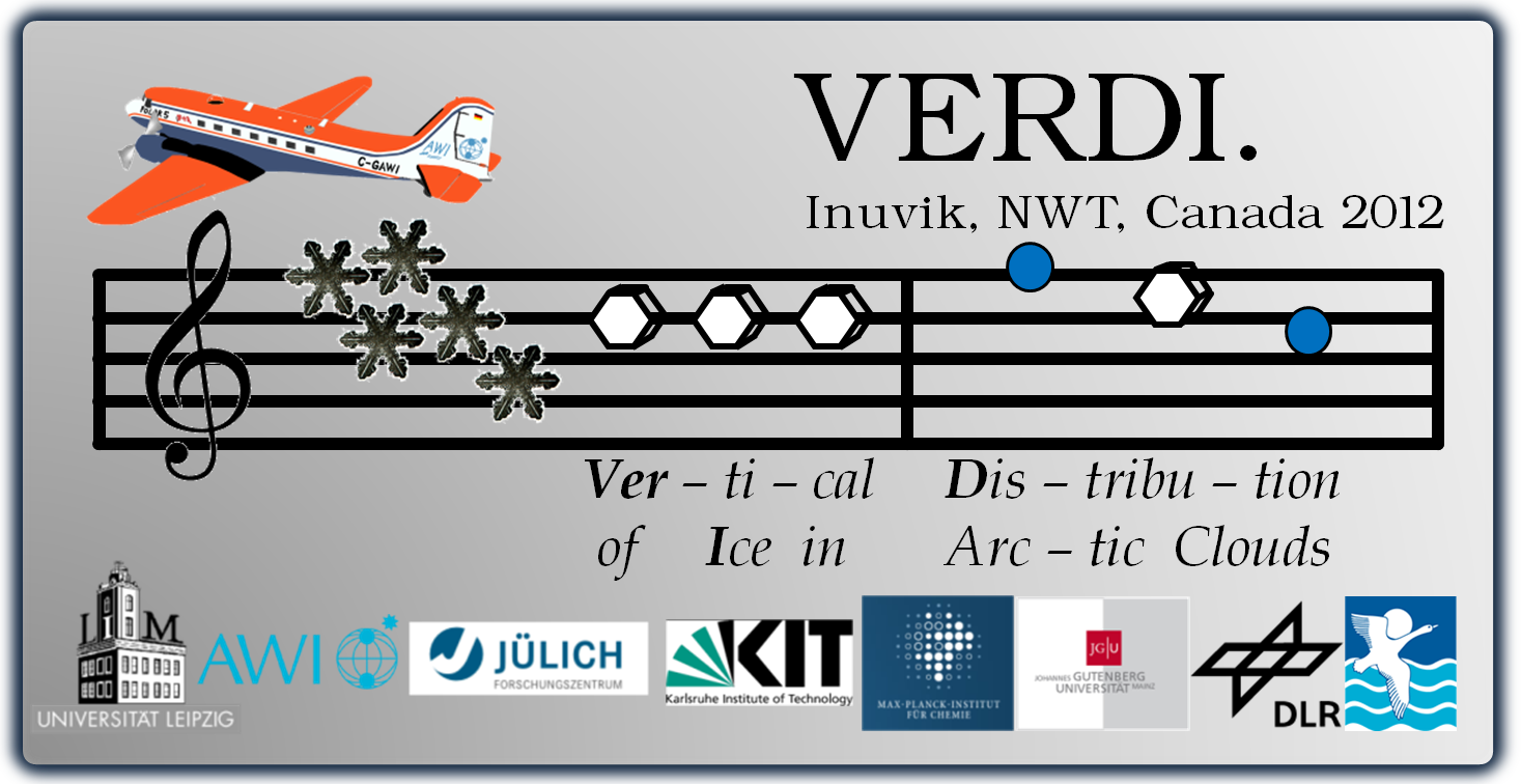 Logo der Messkampange VERDI